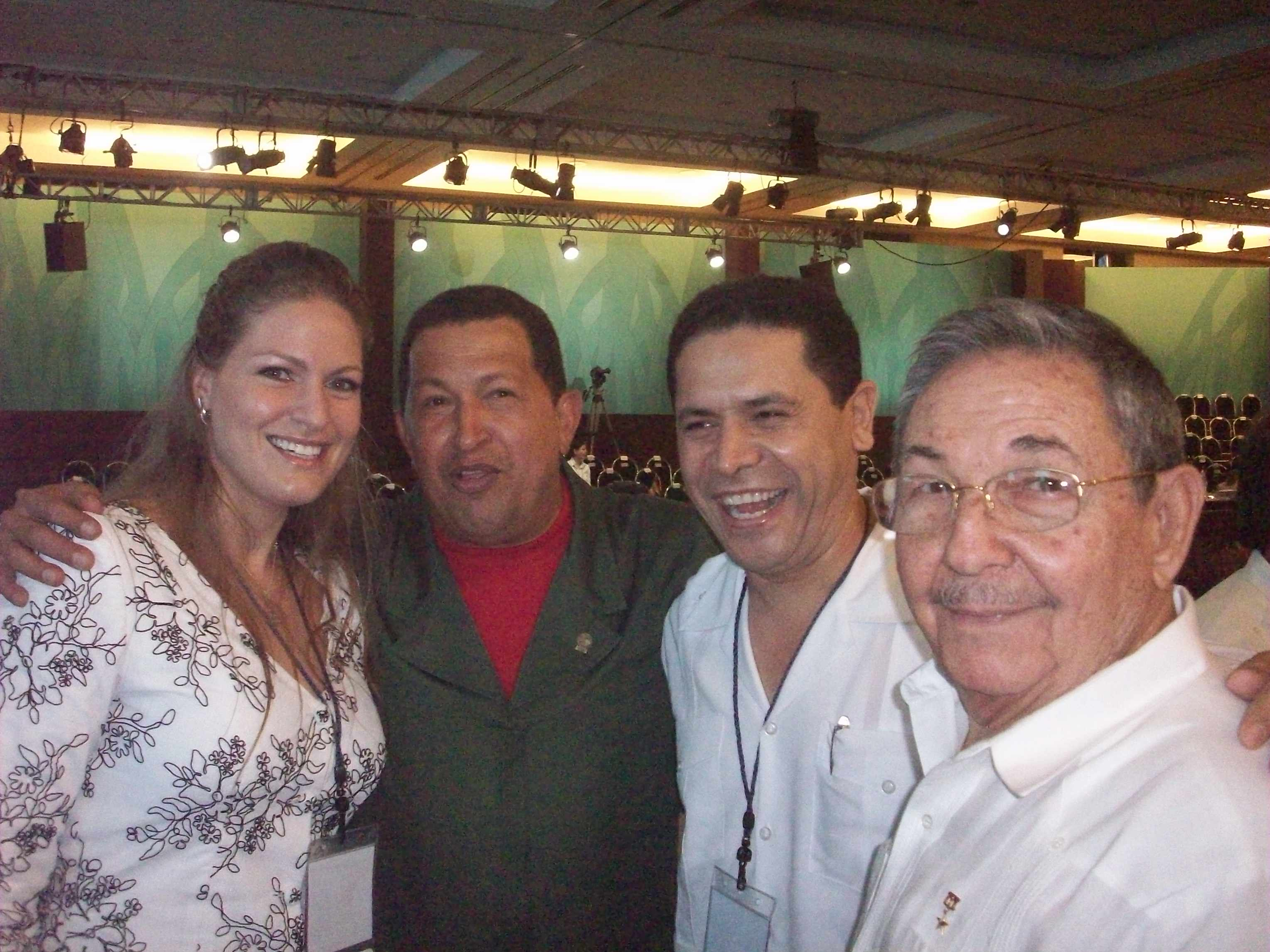 Cumbre de la Unidad de América Latina y el Caribe, en estado de Quintana Roo, México. Foto tomada en compañía del presidente de Venezuela, Hugo Chávez, y presidente de Cuba, Raul Castro.